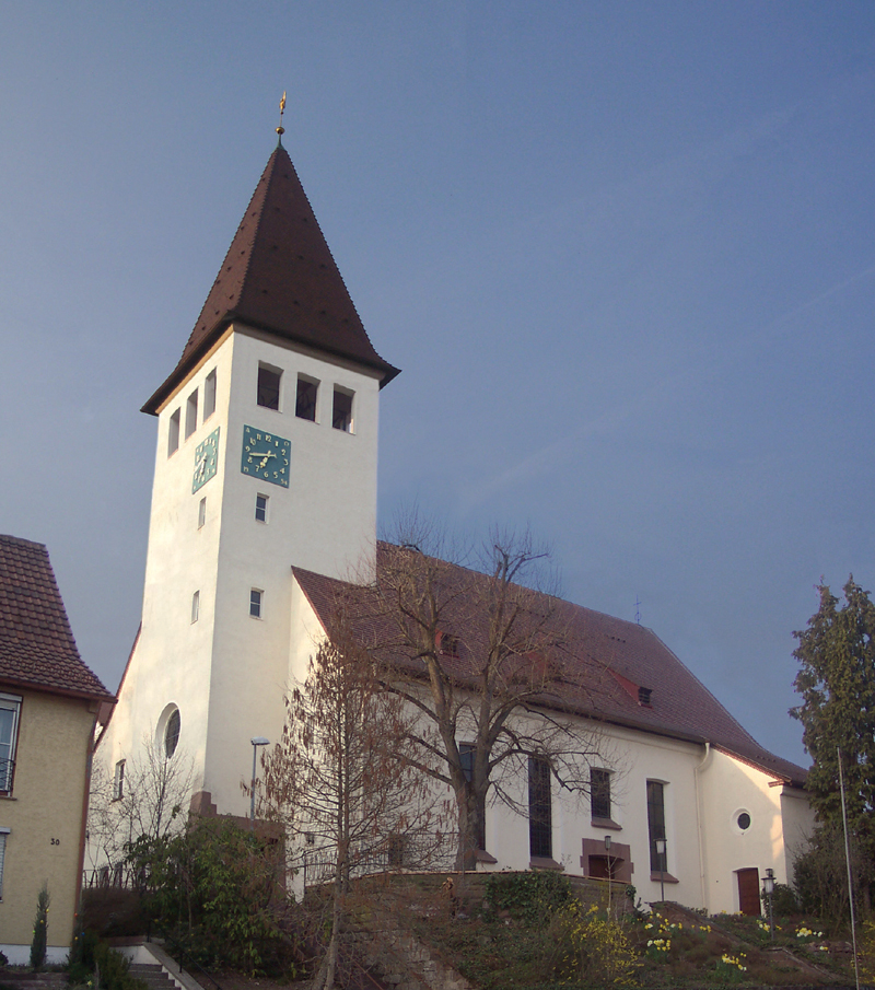 Auferstehungskirche in Stuttgart - Botnang